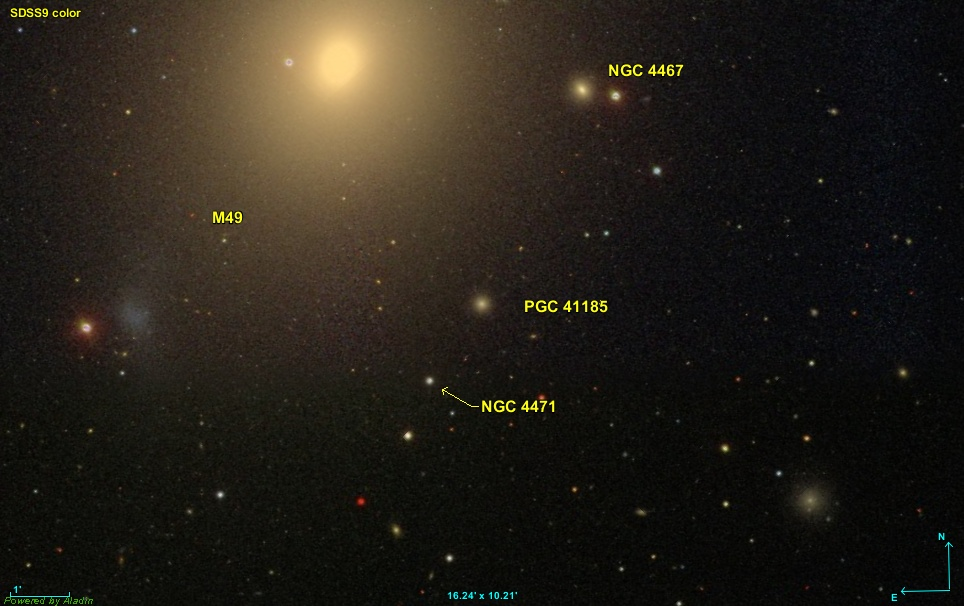 Réalisé avec Aladin et les données du relevé SDSS